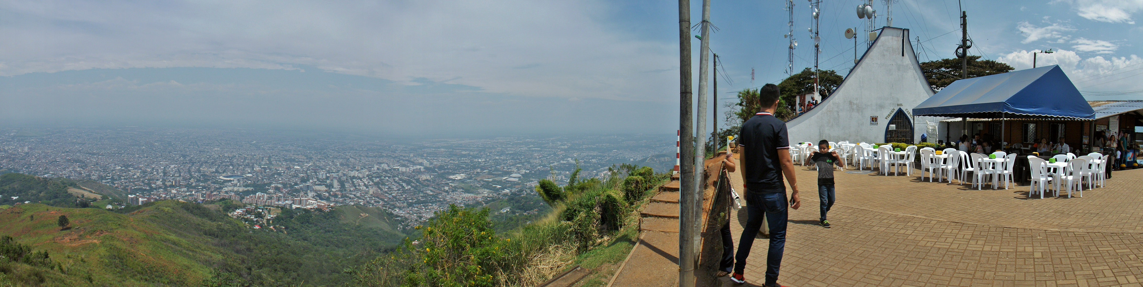 Cerro de Cristo Rey.